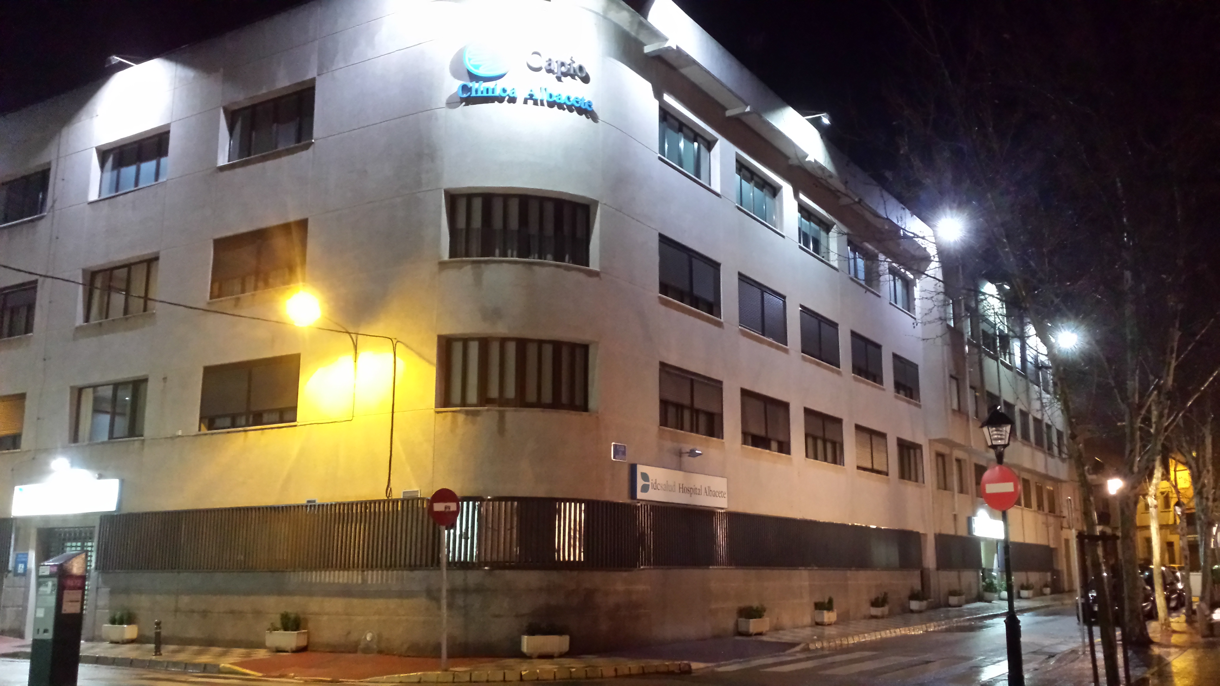 idcsalud Hospital de Albacete